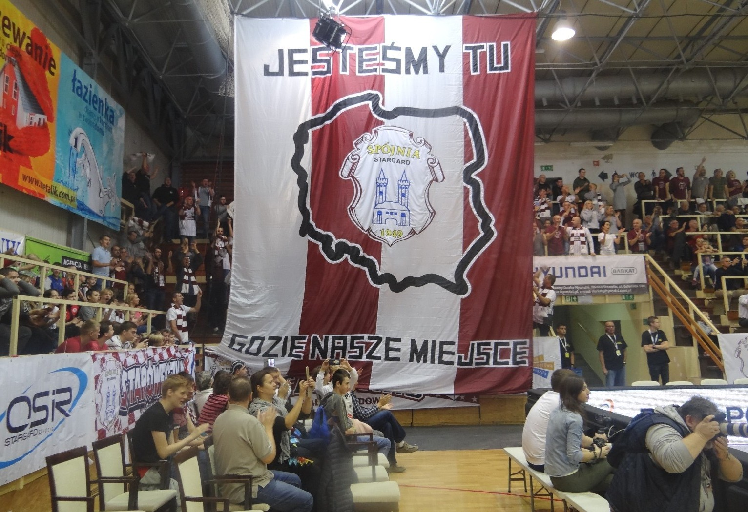 Sektorówka Spójni (06.10.2018)